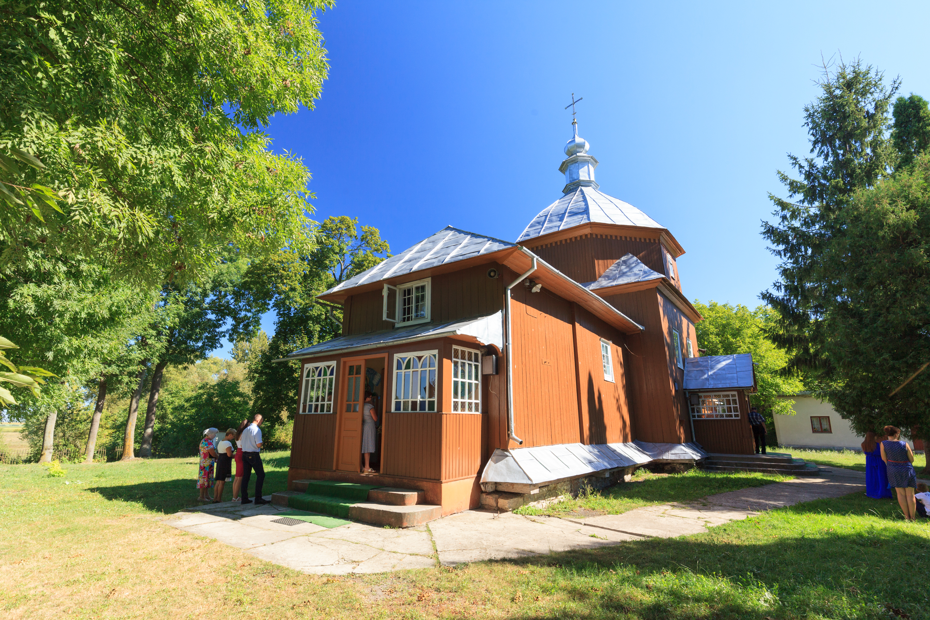 Церква Собору Пресвятої Богородиці (дер.), Задвір'я